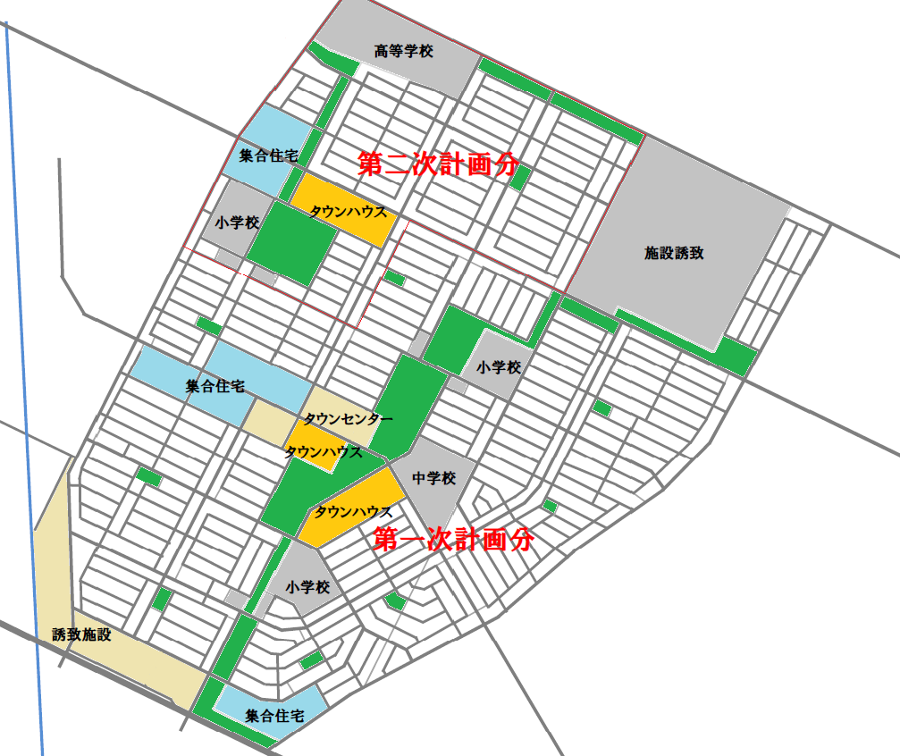 恵庭住宅団地開発整理事業基本構想図を基に作成